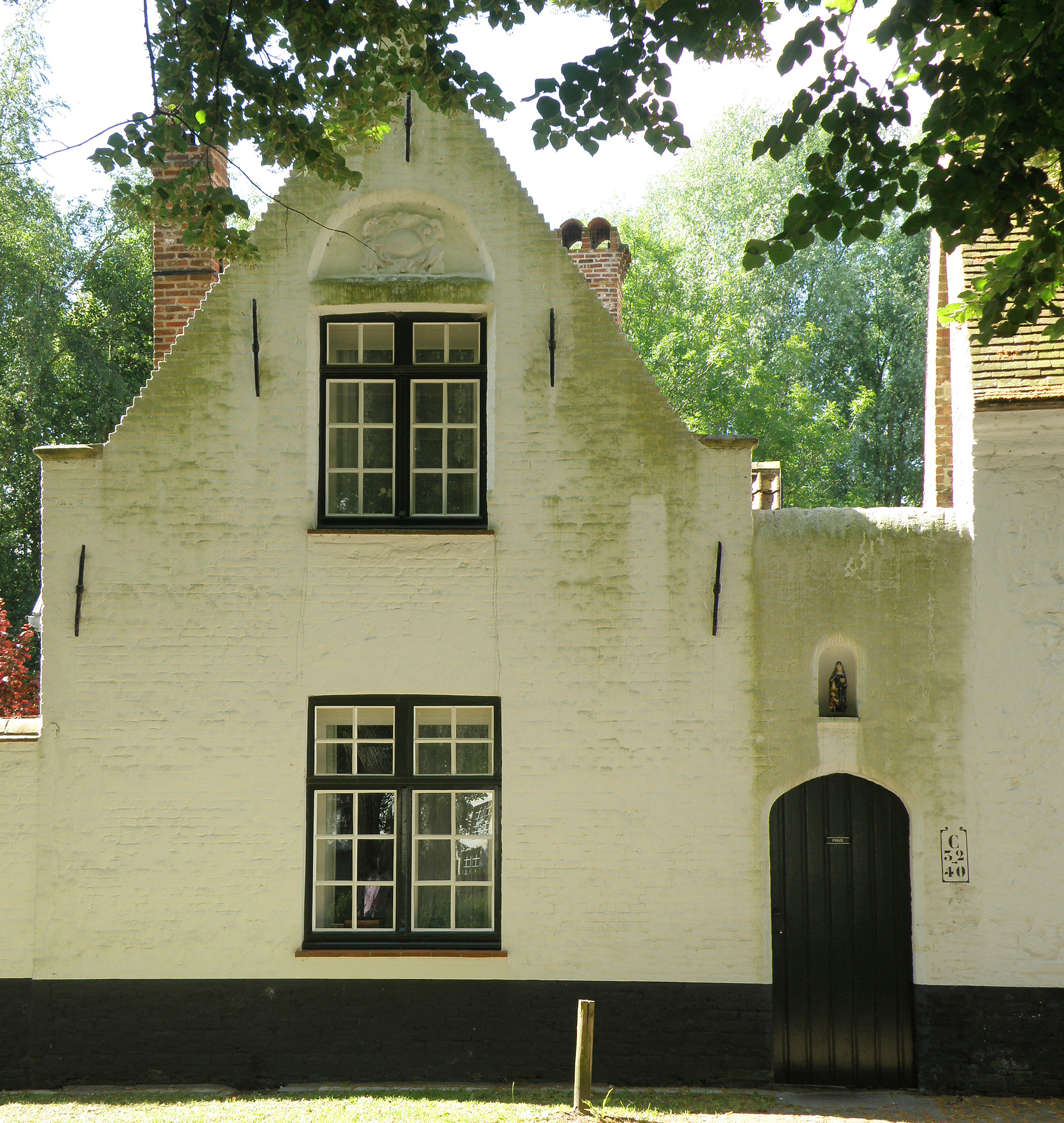 Brugge, Begijnhof. Dopsconvent, gesticht in 1338.